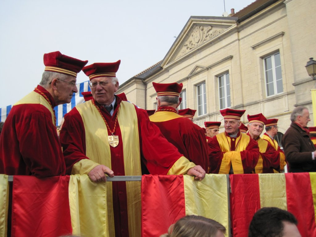 Membre de la Commanderie des Nobles Vins du Jura et du Comté à la pressé du vin de paille de Arlay dans le Jura en 2010